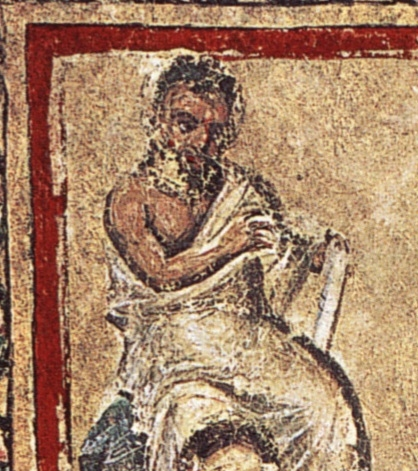 Der antike griechische Arzt und Pharmakologe Krateuas. Ausschnitt aus der „Galenosgruppe“ im Wiener Dioskurides (linke obere Ecke)